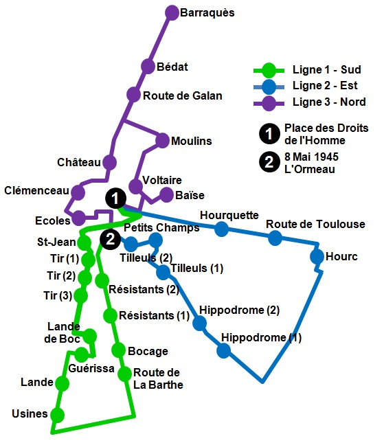 Lignes de Bus de Lannemezan (Hautes-Pyrénées, France).